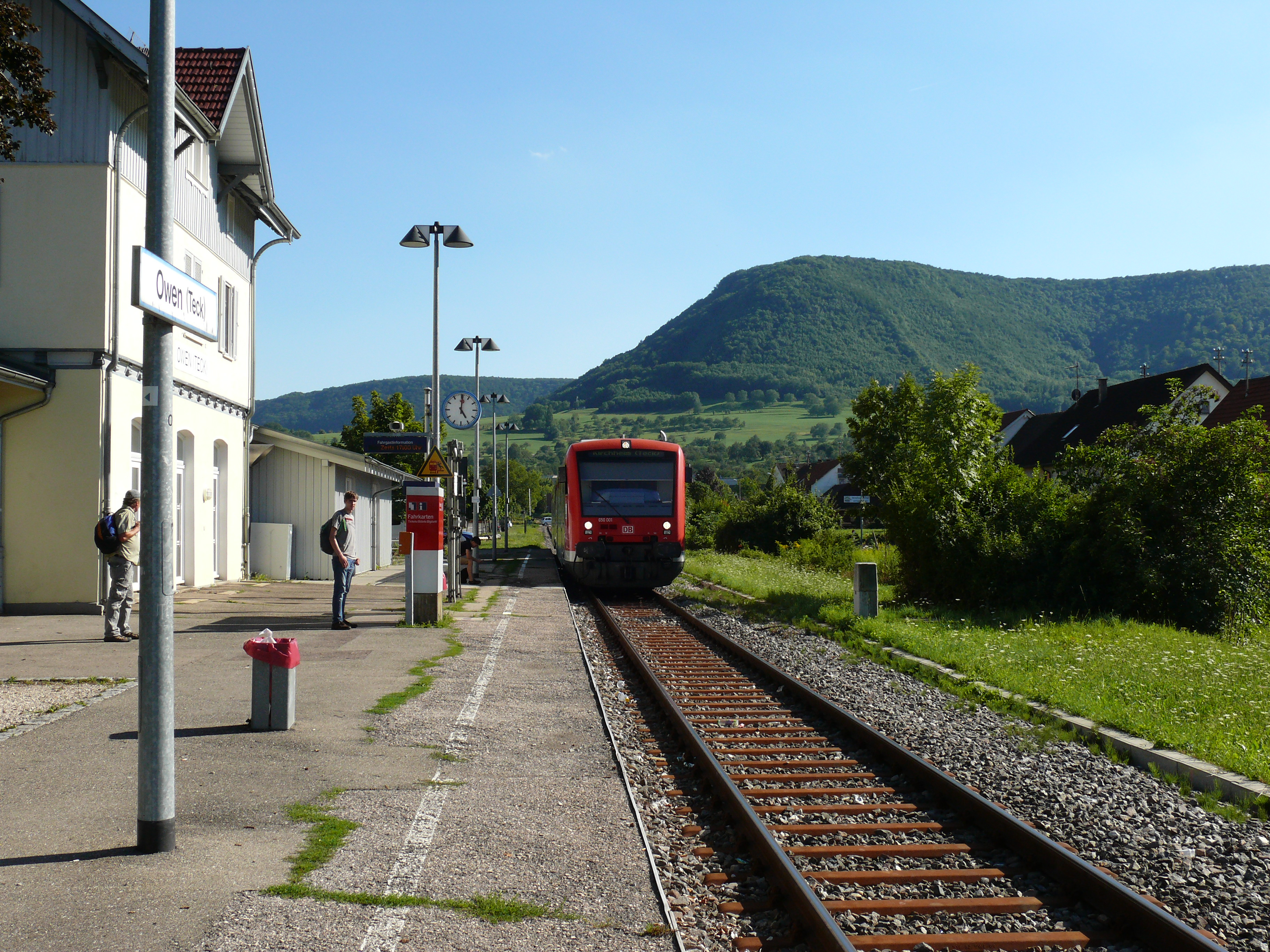 Der Haltepunkt Owen an der Teckbahn, mit einfahrendem RegioShuttle.